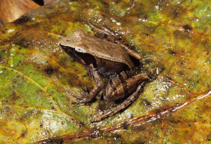 Ranomafana National Park Mantidactylus aerumnalis